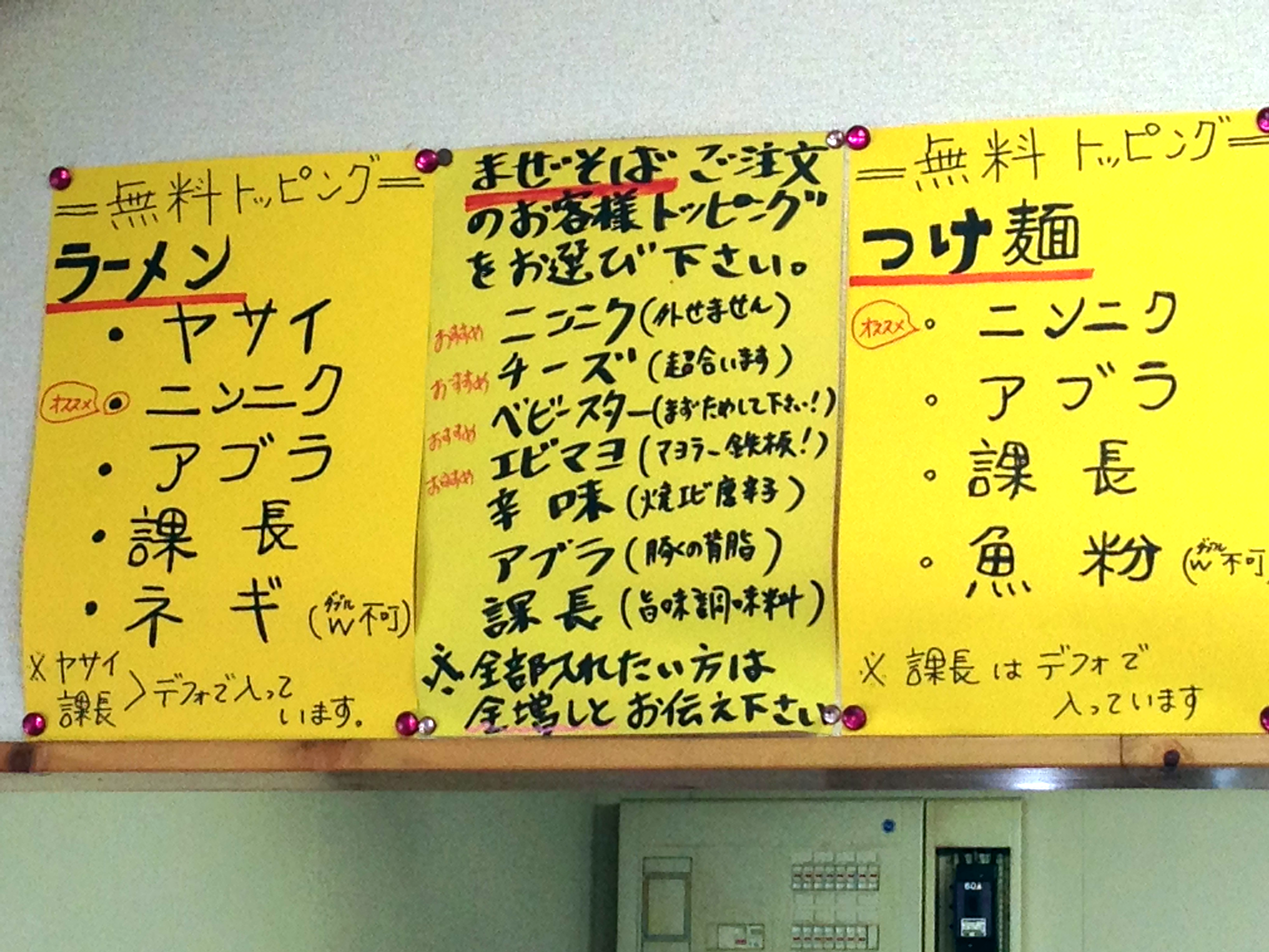 日本国内のラーメン店内に掲示された、トッピングについての説明。